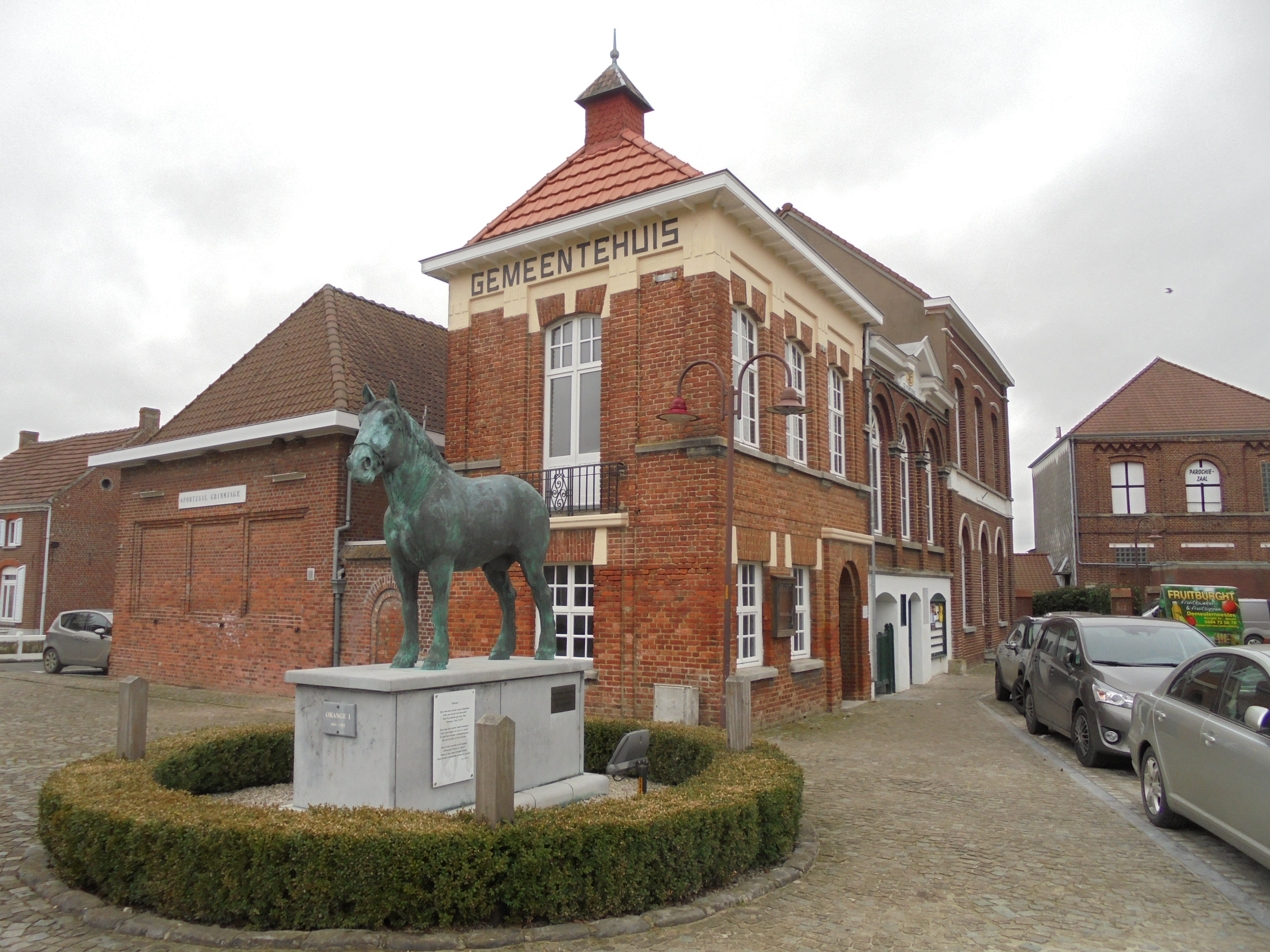 Standbeeld van het paard Orange I - Grimmingeplein - Grimminge - Geraardsbergen - Oost-Vlaanderen - België